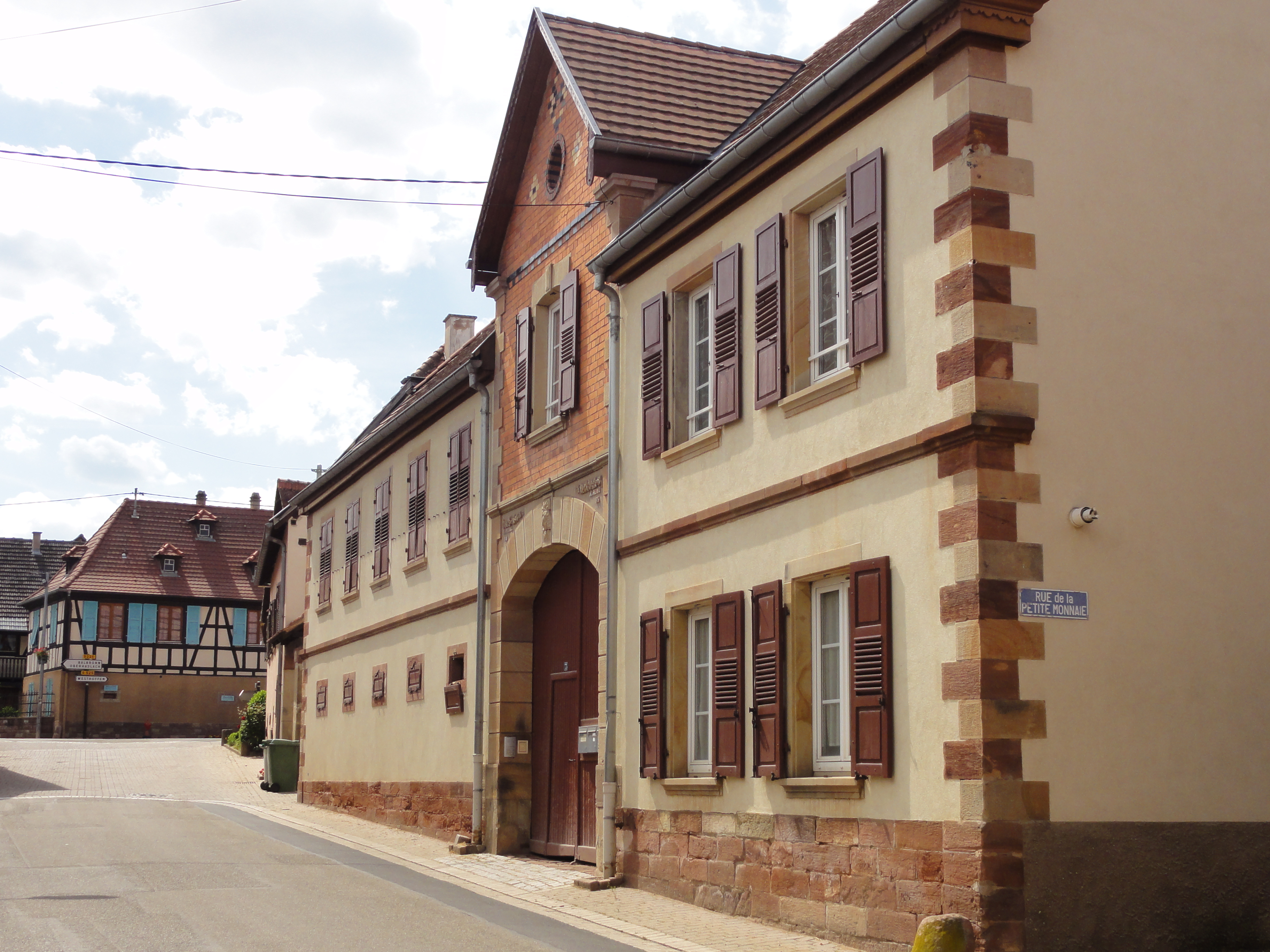 Alsace, Bas-Rhin, Traenheim, Ferme (1895), 73 rue Principale. .